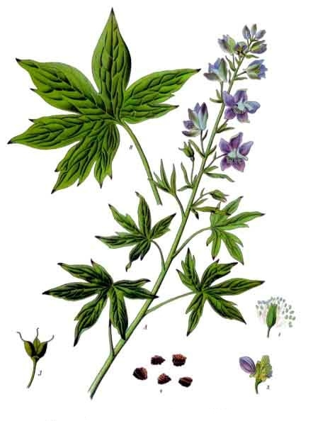 Stephanskraut. A Blühende Pflanze. B Unteres Stengelblatt. 1 Androeceum und Gynaeceum; 2 hinteres Kelchblatt, hintere und seitliche Blumenblätter; 3 unreife Frucht; 4 Samen. — A, B, 1, 2, 4 natürliche Grösse. 3 vergrössert.